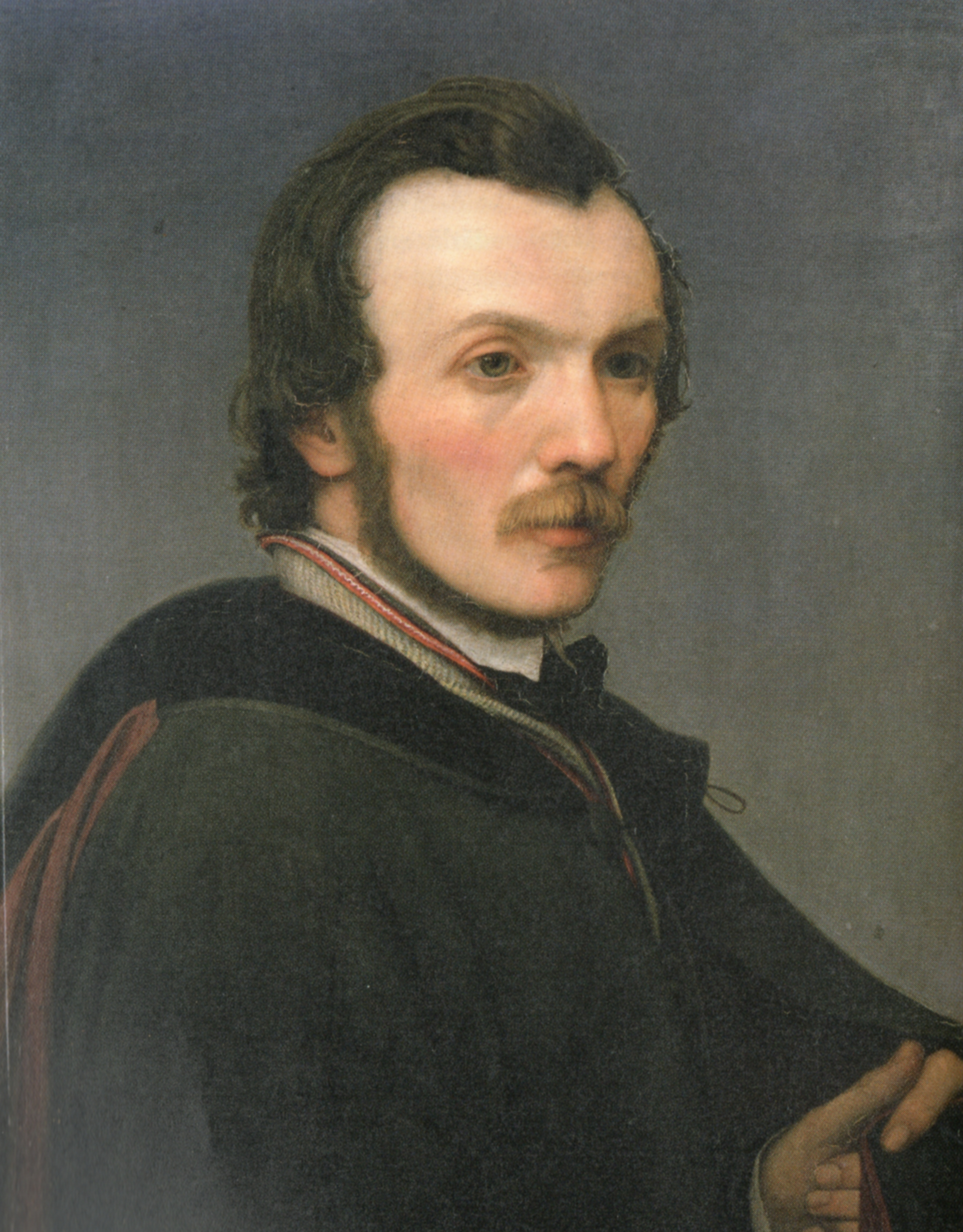 Selbstportait Friedrich Wasmann